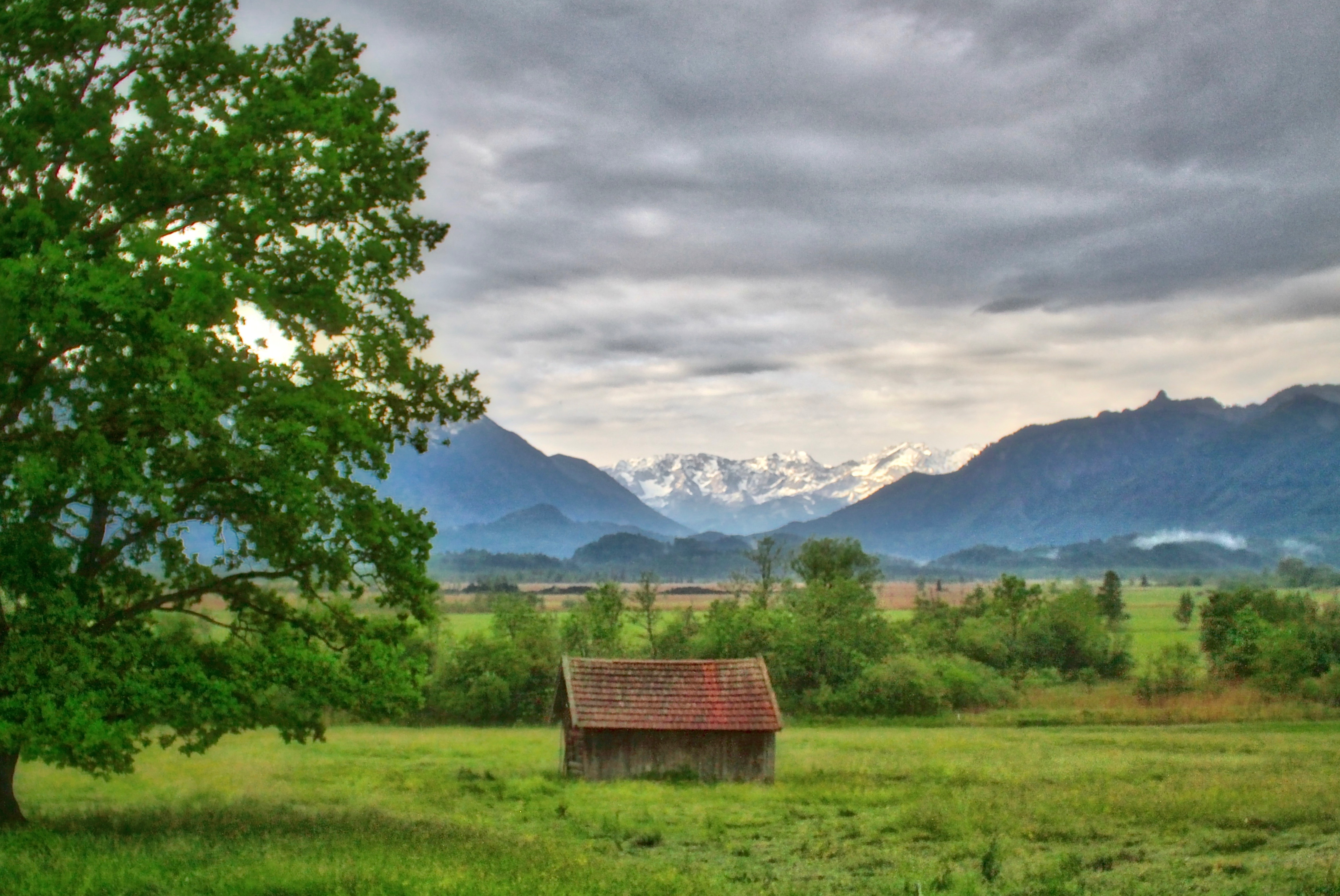 Moos-Wanderweg durch das Murnauer Moos